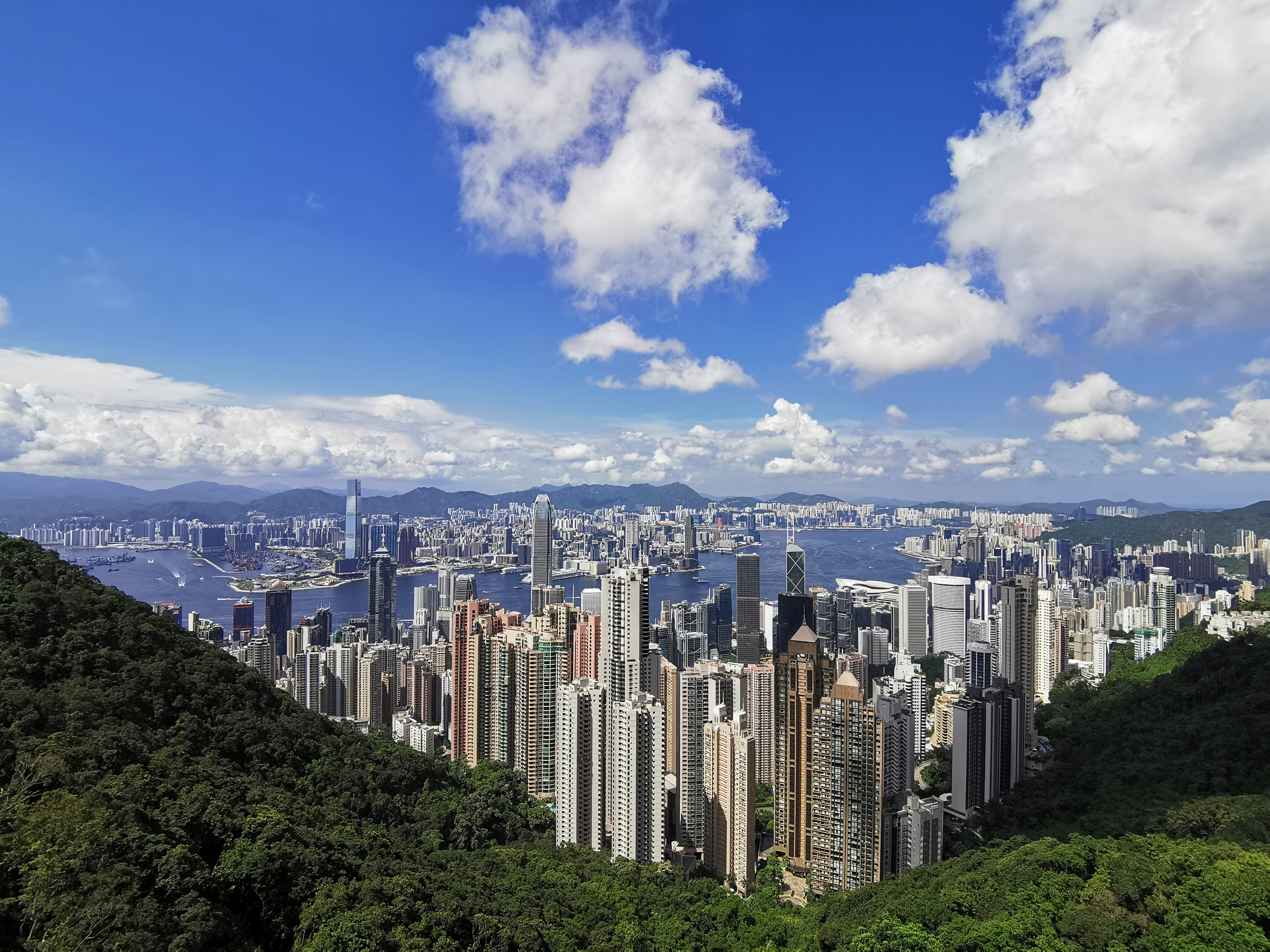 此作品拍摄于香港太平山（Victoria Peak）山顶观光台，该视角可俯瞰维多利亚港，图中可见维多利亚港繁华风景。